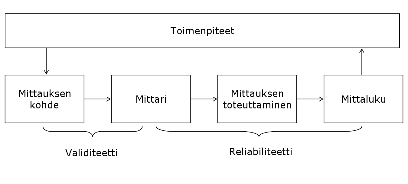 Hyvän mittaamisen kriteerit